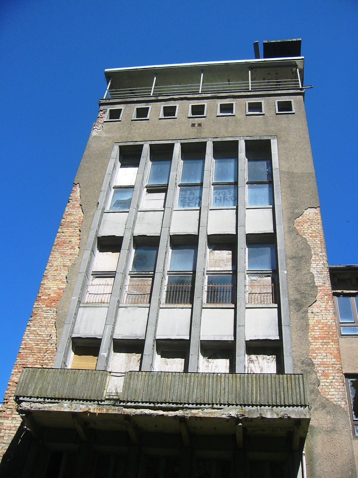 Ehemaliger Turm der Großherzoglichen Mecklenburgischen Navigationsschule (später Seefahrtschule Wustrow) in Wustrow (Fischland)